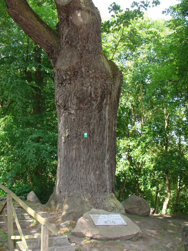 121. Dąb szypułkowy - pomnik przyrody - po zachodniej stronie Dworu I, ul. Polanki 125. Obwód w 2014 wynosił 622 cm. Drzewo na skutek podcięcia ma zachwianą statykę.